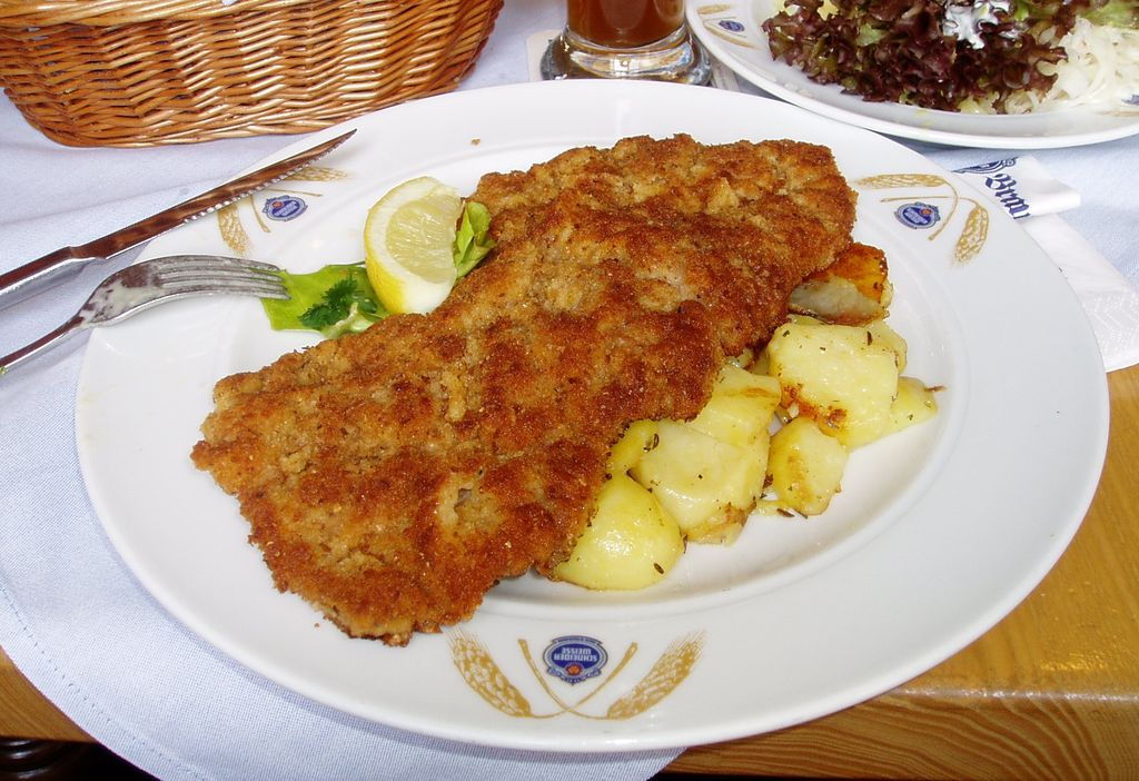 Wiener Schnitel, ate and photographed by me at Weißes Bräu, Munich